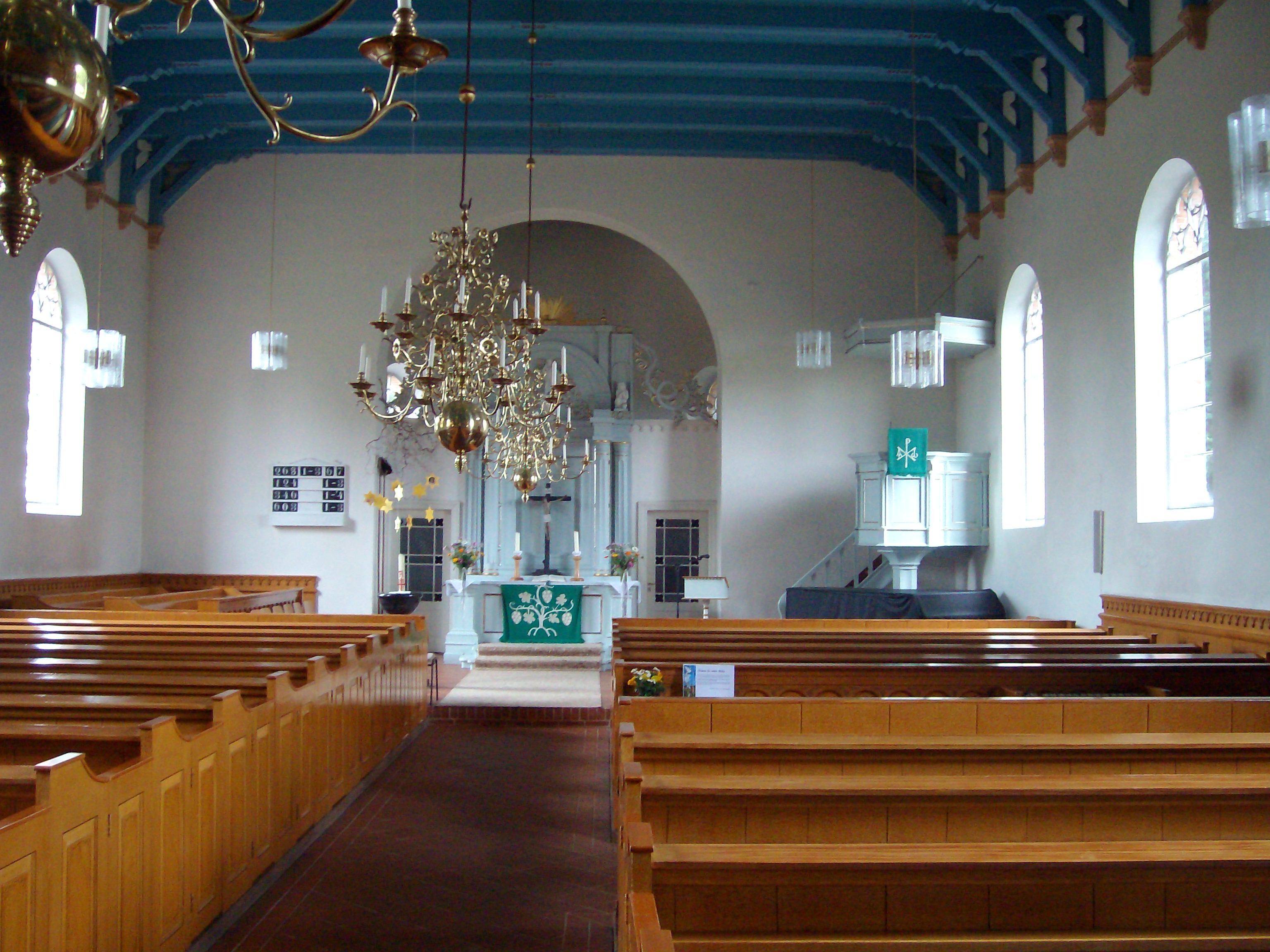 Innenraum Reformierte Kirche in Jheringsfehn